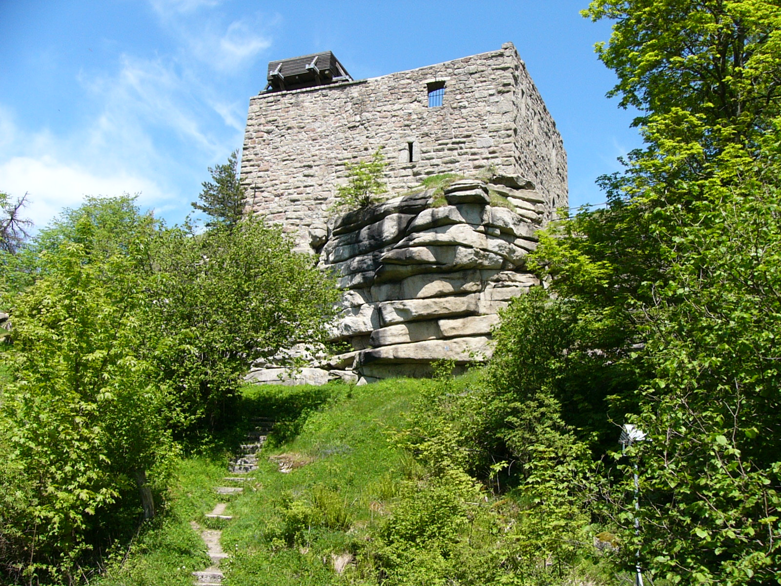 Haupthaus, Burgruine Epprechtstein